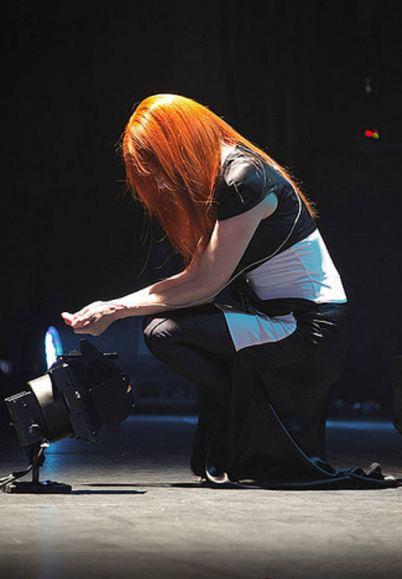 Tori Amos en concert à paris le 3 Octobre 2009